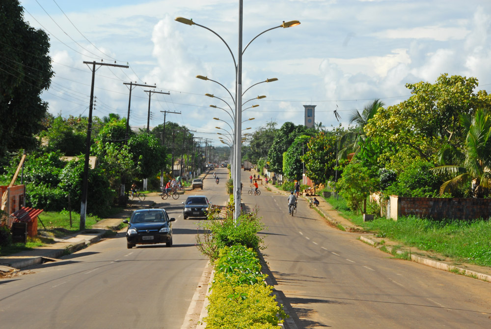 Avenida Avelino Chaves - Sena Madureira Acre